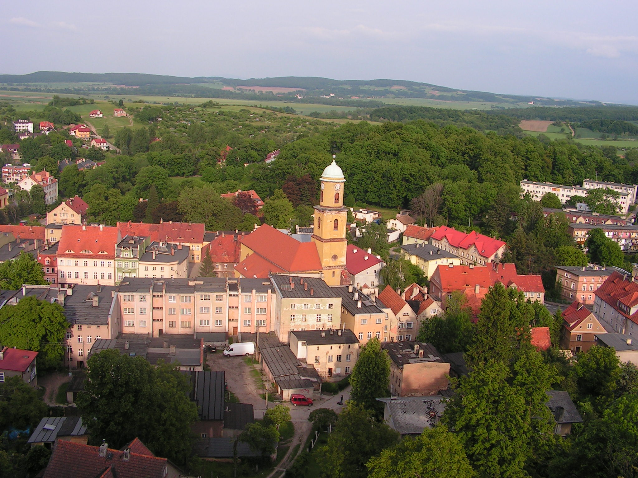 Panorama Bolkowa z zamku